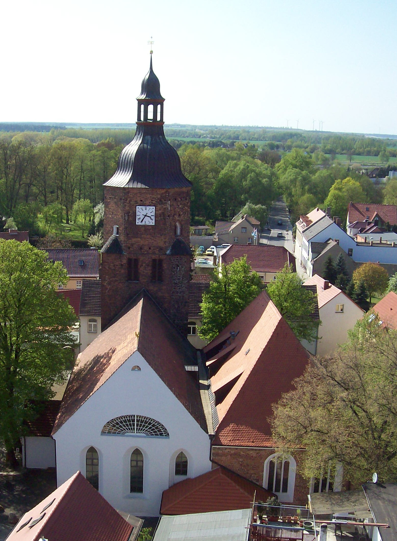 Doppelkirche Vetschau Hornjoserbsce: Serbsko-němska dwójna cyrkej we Wětošowje